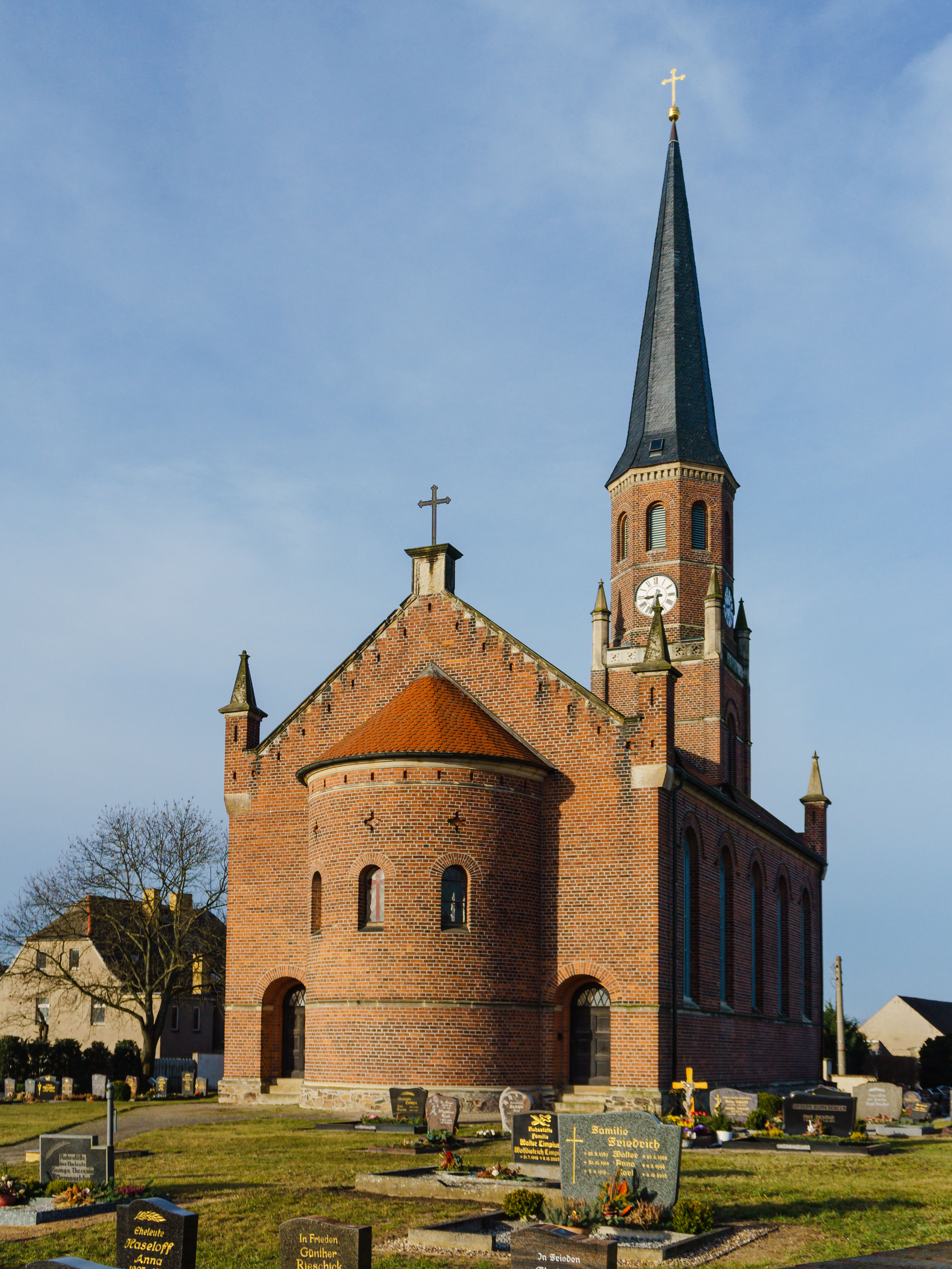 Kirche, Torgauer Straße 1a in Laußig OT Pressel